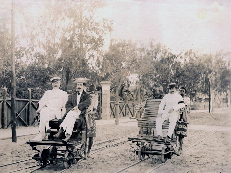 O Governador e o Secretário Geral a caminho da Repartição, usando como meio de transporte um trolley.